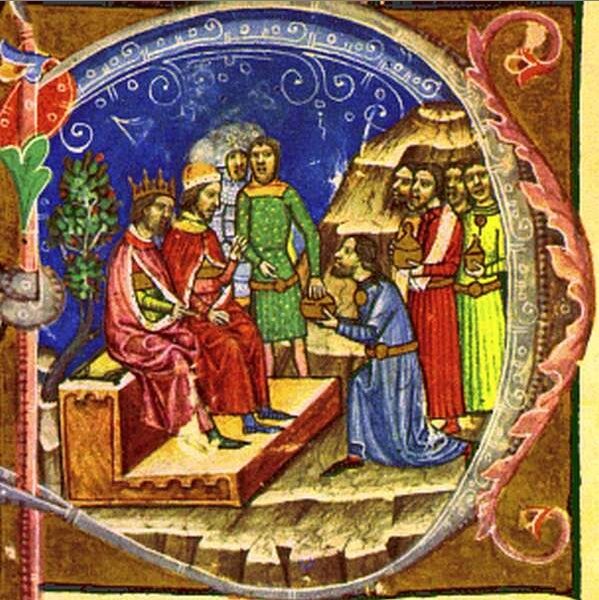 Nis lakói hódolnak Salamon király és Géza herceg előtt